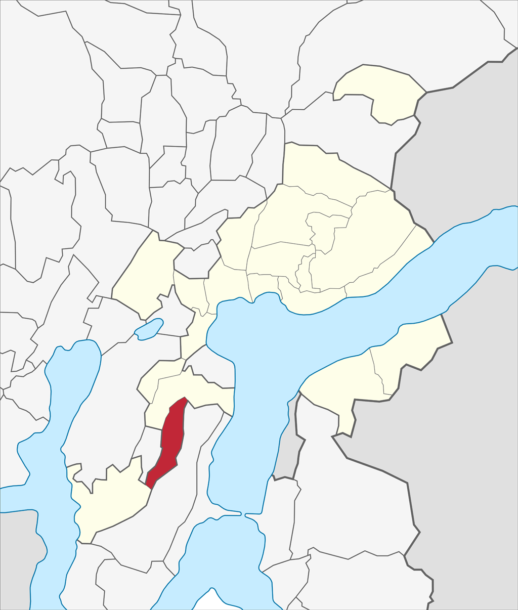 Localizzazione del quartiere di Carabbia nel territorio comunale di Lugano